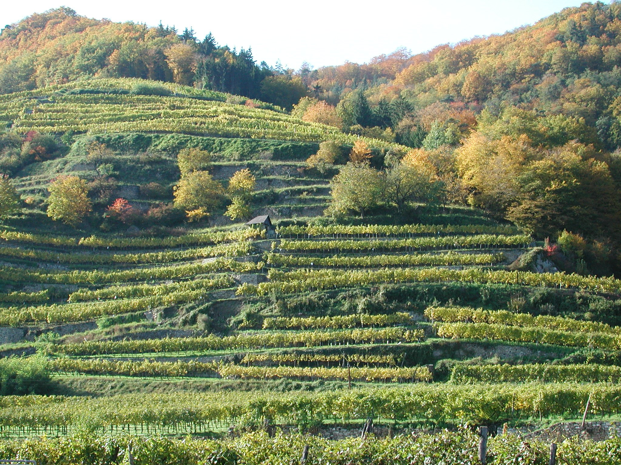 Terrassenweingärten in der Wachau werden seit 1976 mit einer Tropfbewässerung mit Wasser versorgt.